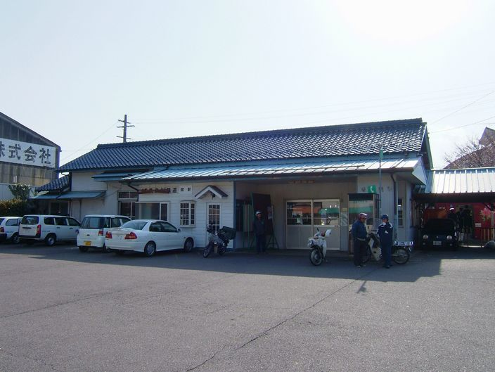 長良川鉄道越美南線ja:関駅 関駅の駅舎。 2006年4月3日にGACHANが撮影しました。